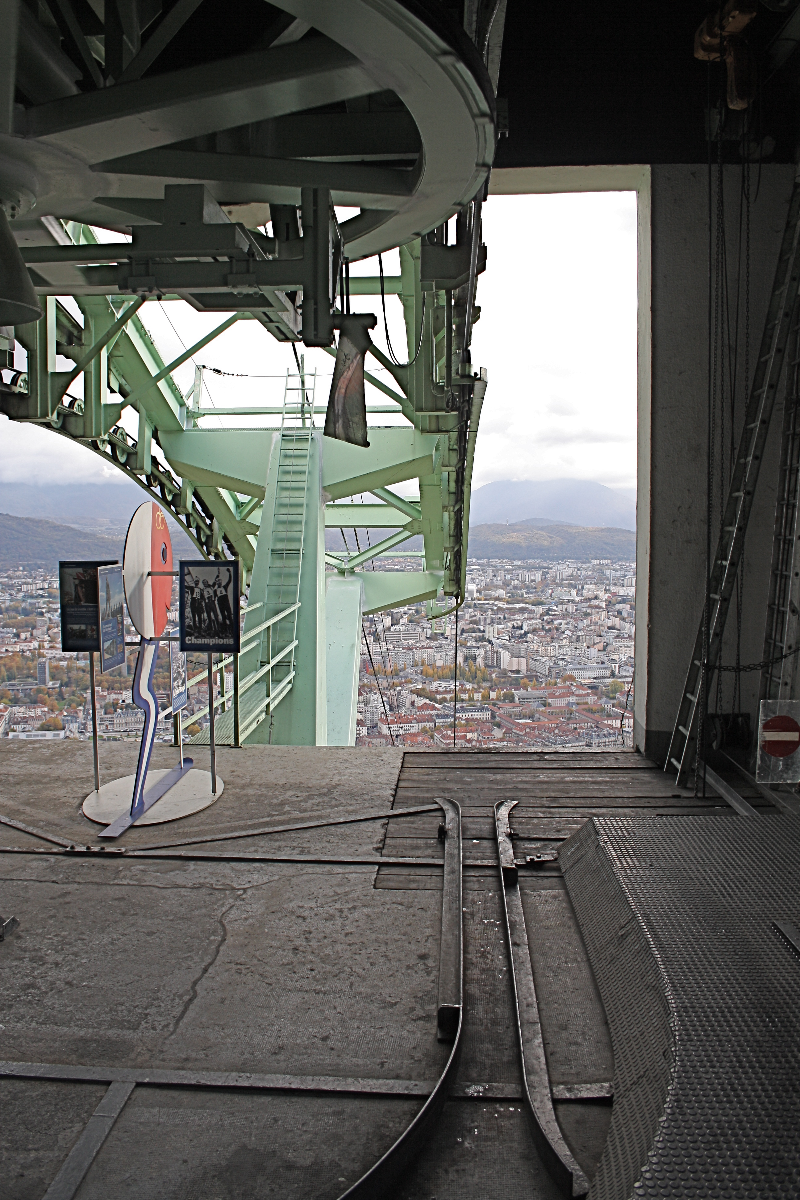 Umlaufanlage der Seilbahn Grenoble (Bergstation)